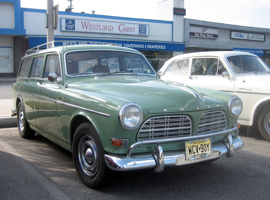 1966 Volvo Amazon Wagon